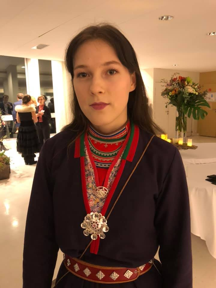 Upmisámi artista Katarina Barruk/Den umesamiske artisten Katarina Barruk